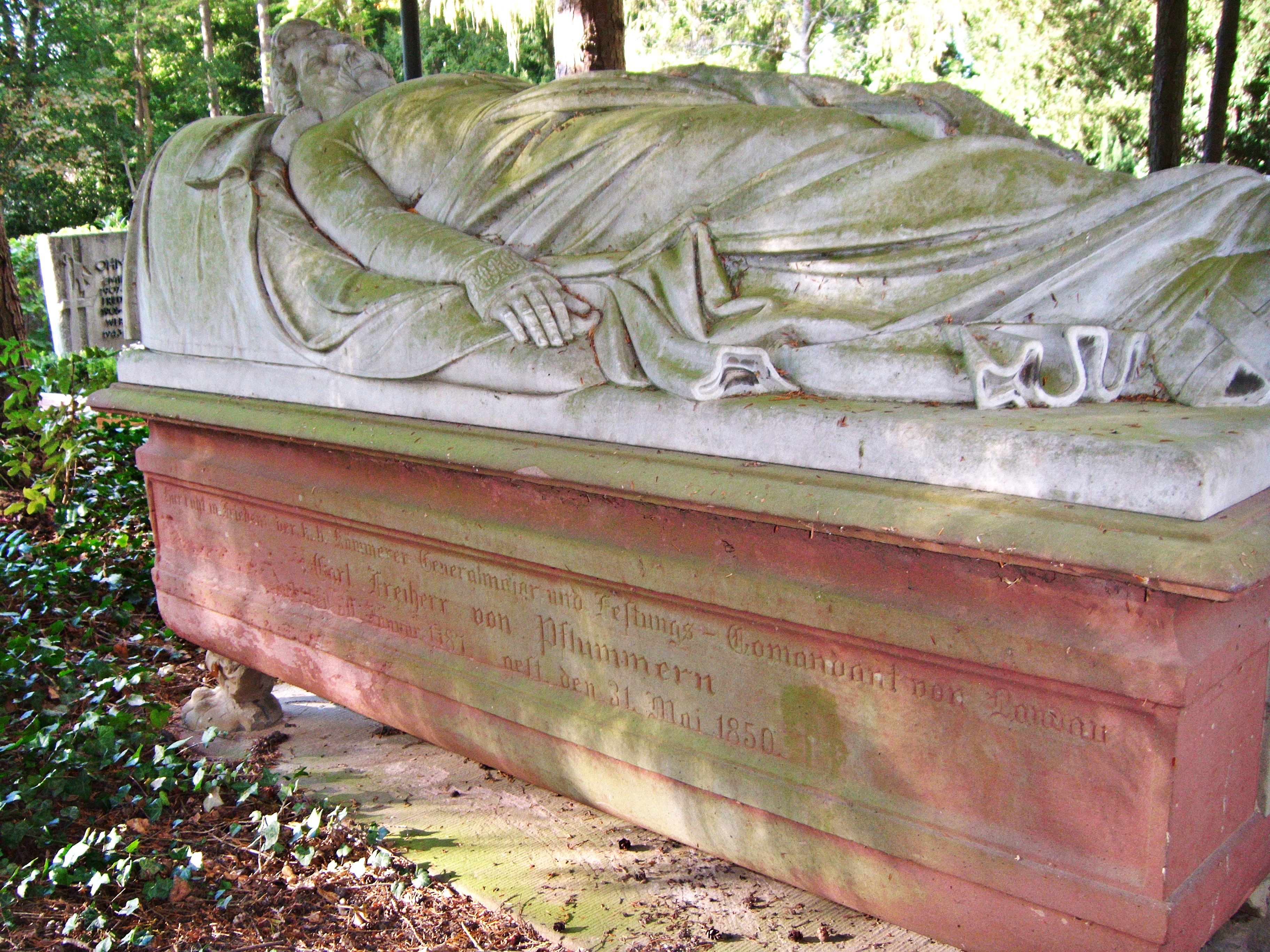 Karl Freiherr von Pflummern (1787-1850), Bayerischer Generalmajor und Festungskommandant von Landau (Pfalz), Grabmal, Friedhof Landau